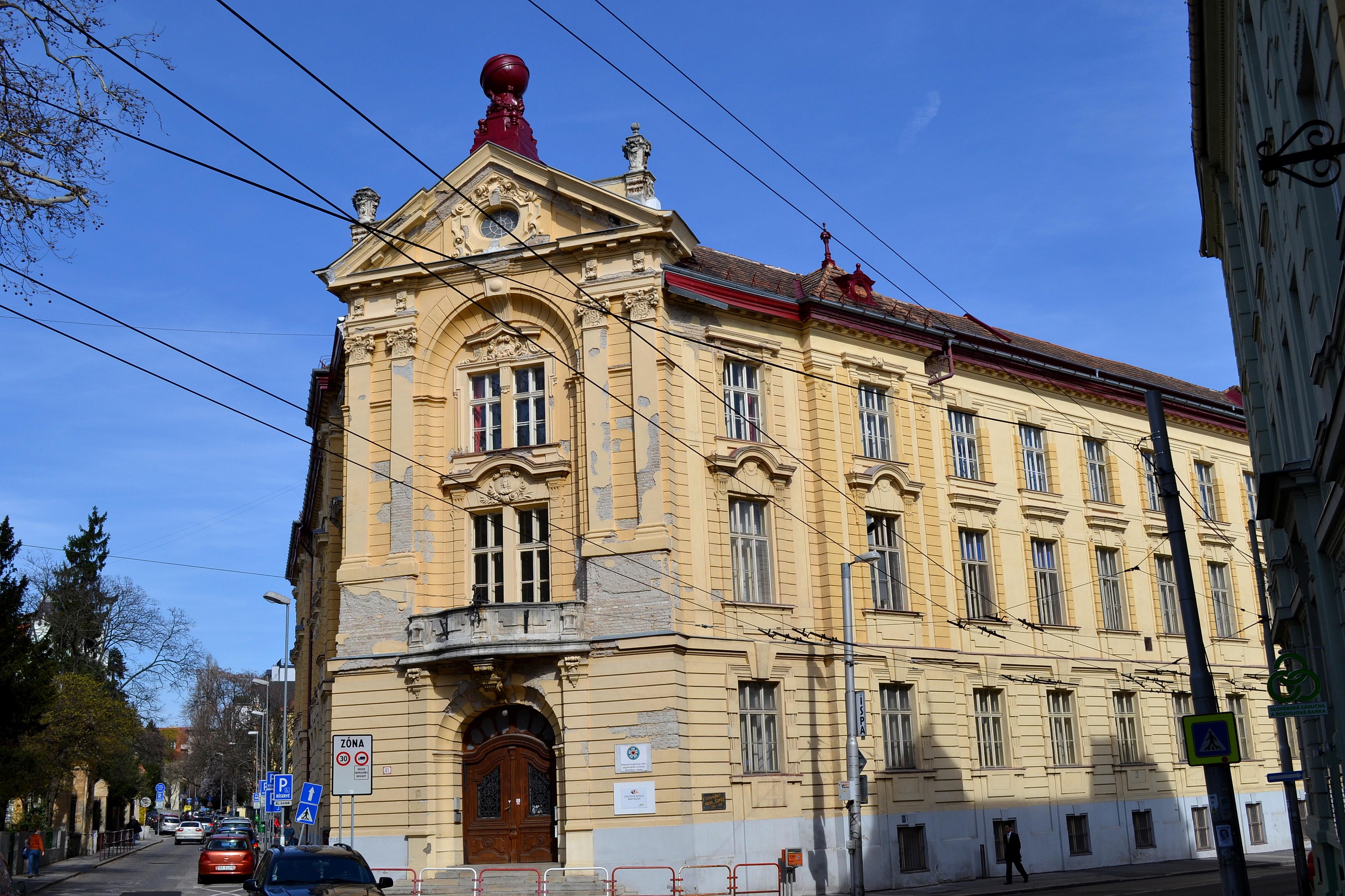 Palisády č. 51.Celkový pohľad na budovu, v ktorej sídli súkromná Spoločná nemecko-slovenská škola a Súkromné nemecko-slovenské gymnázium. Stavba v neobarokovom slohu vznikla v roku 1896 podľa projektu Ignáca Alpára (1855 - 1928). Pred rokom 1989 v budove sídlila škola umeleckého priemyslu